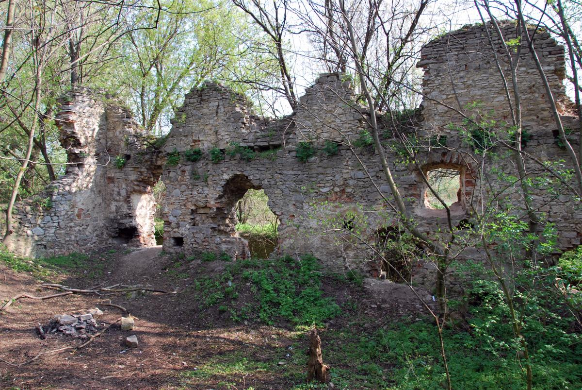 Papírmalom romjai, Sóly (Veszprém megye)